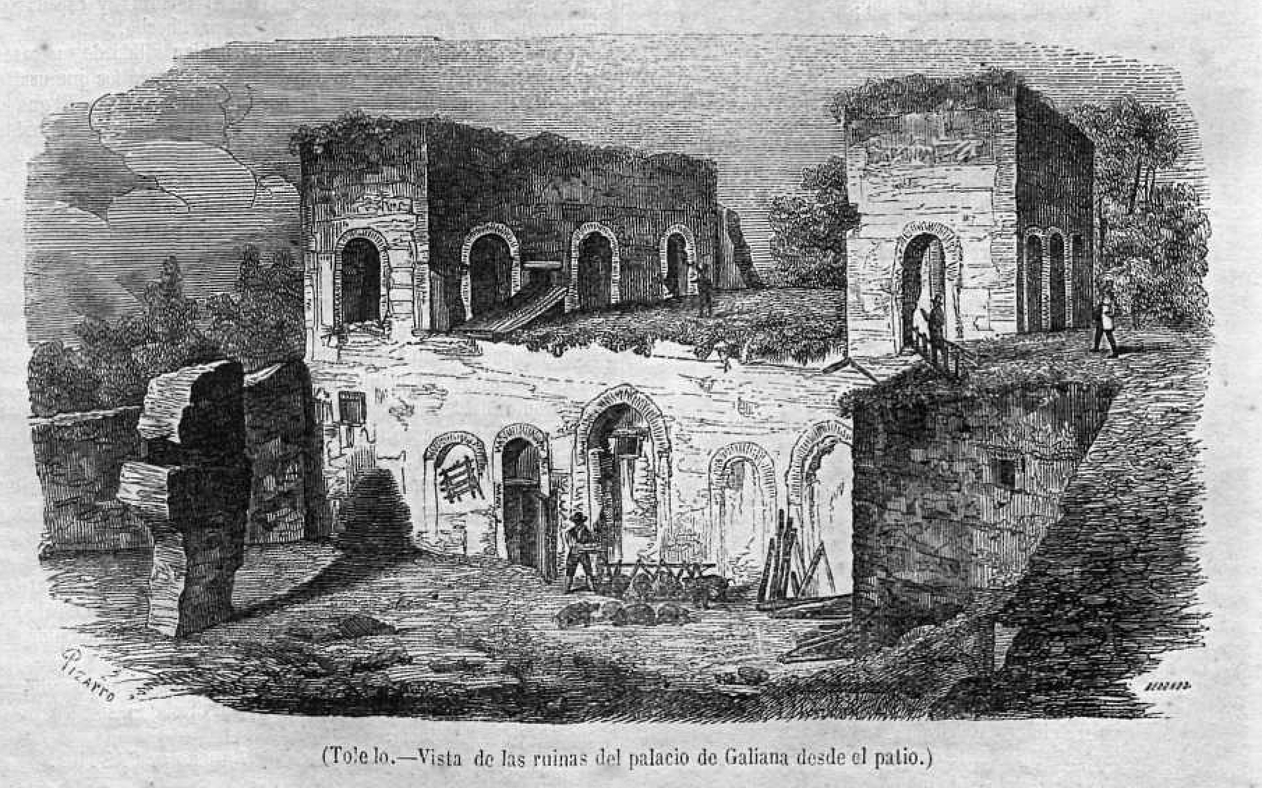 Vista de las ruinas del palacio de Galiana desde el patio.